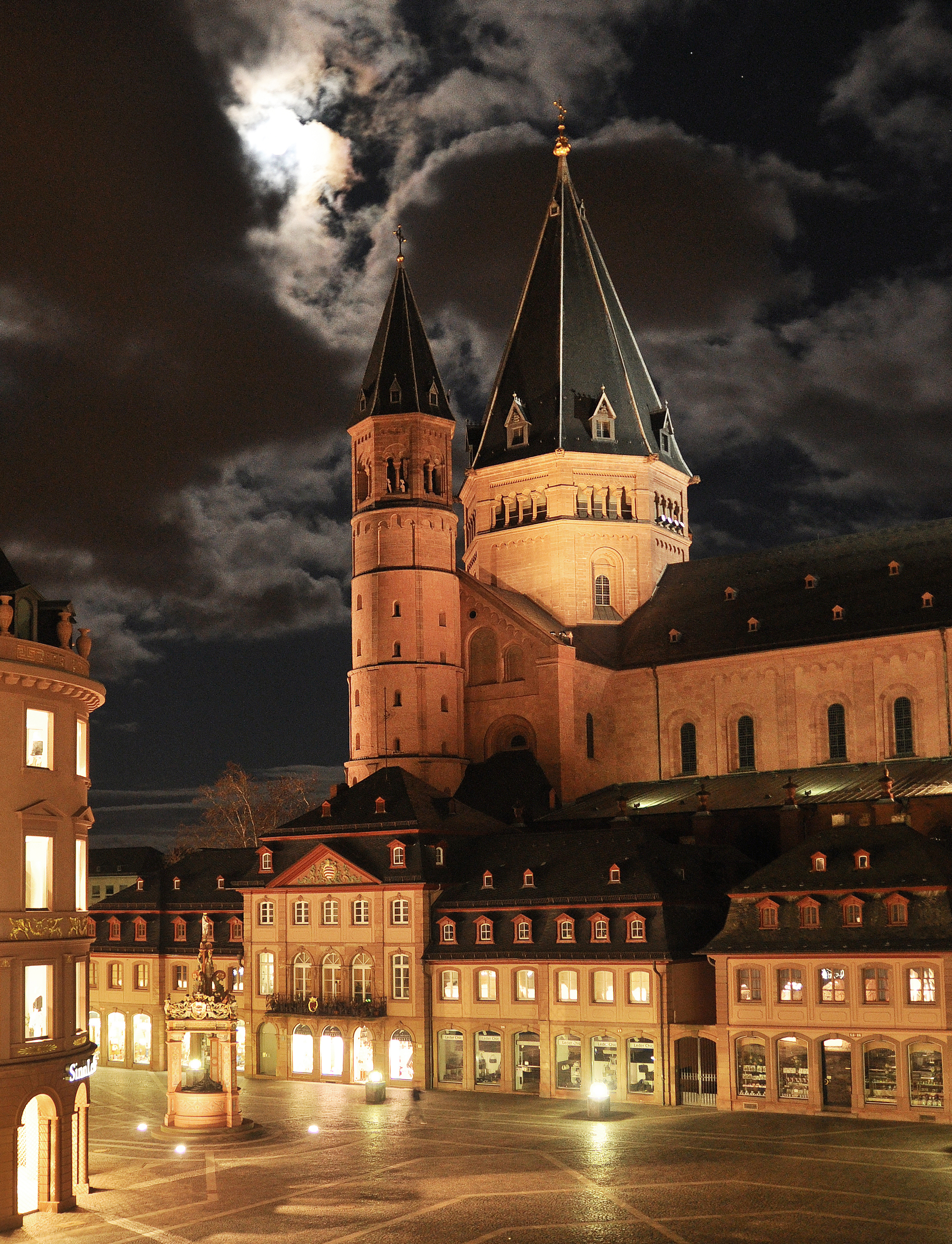 Mainz: Domkirche St. Martin (ca. 975 begonnen), davor: Markt 18–26, Domhäuser mit Ladengeschäften (ca. 1771, Architekt wohl Johann Valentin Thoman) und der Marktbrunnen (Einer der prächtigsten Renaissance-Ziehbrunnen Deutschlands, 1526 von Erzbischof Albrecht gestiftet).